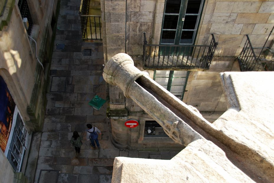 Una de las gárgolas de la Casa del Cabildo rehabilitada en 2011 por el Consorcio de Santiago.